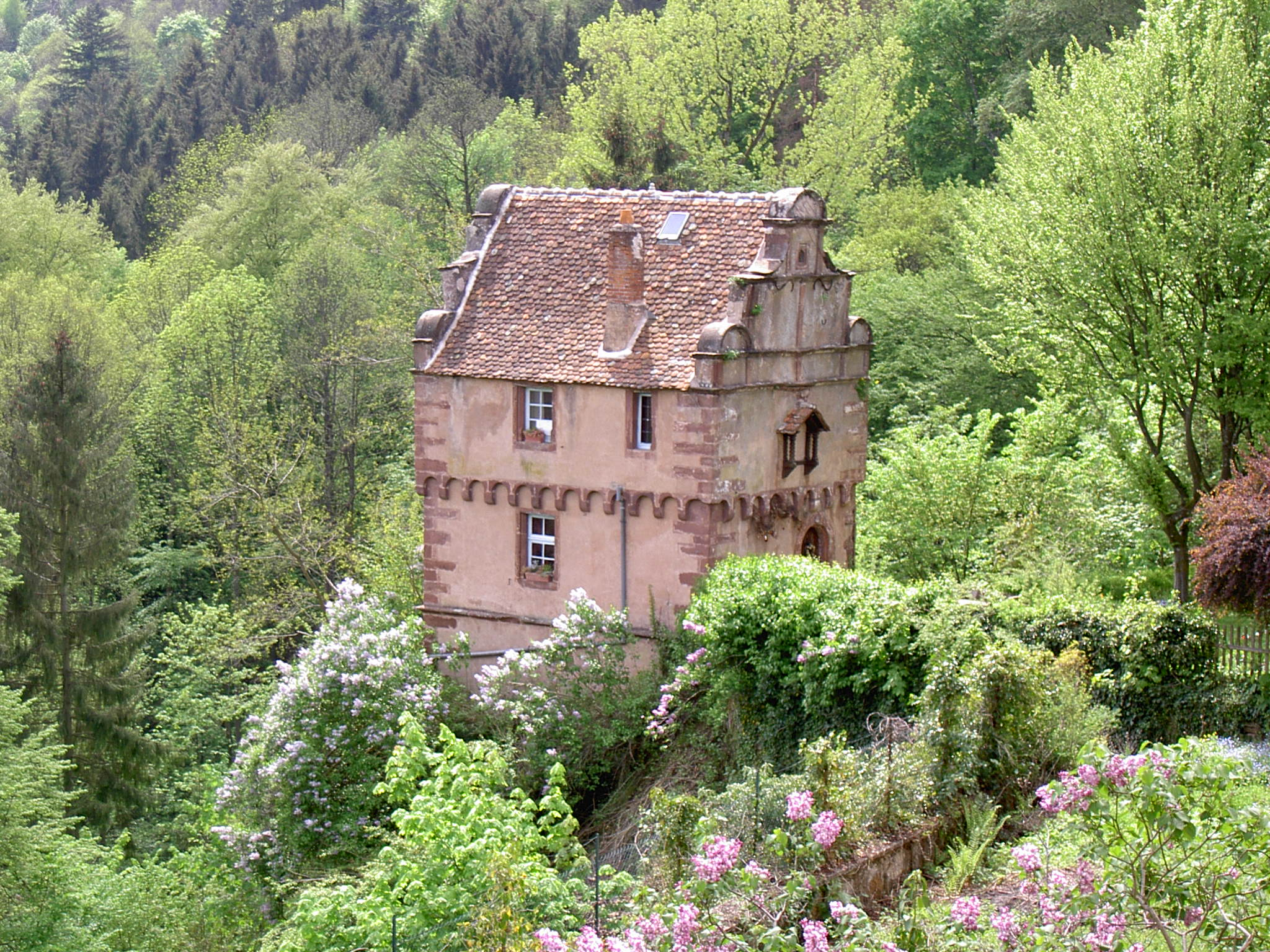 Nordvogesen 2004 La Petite Pierre Maison des Paiens